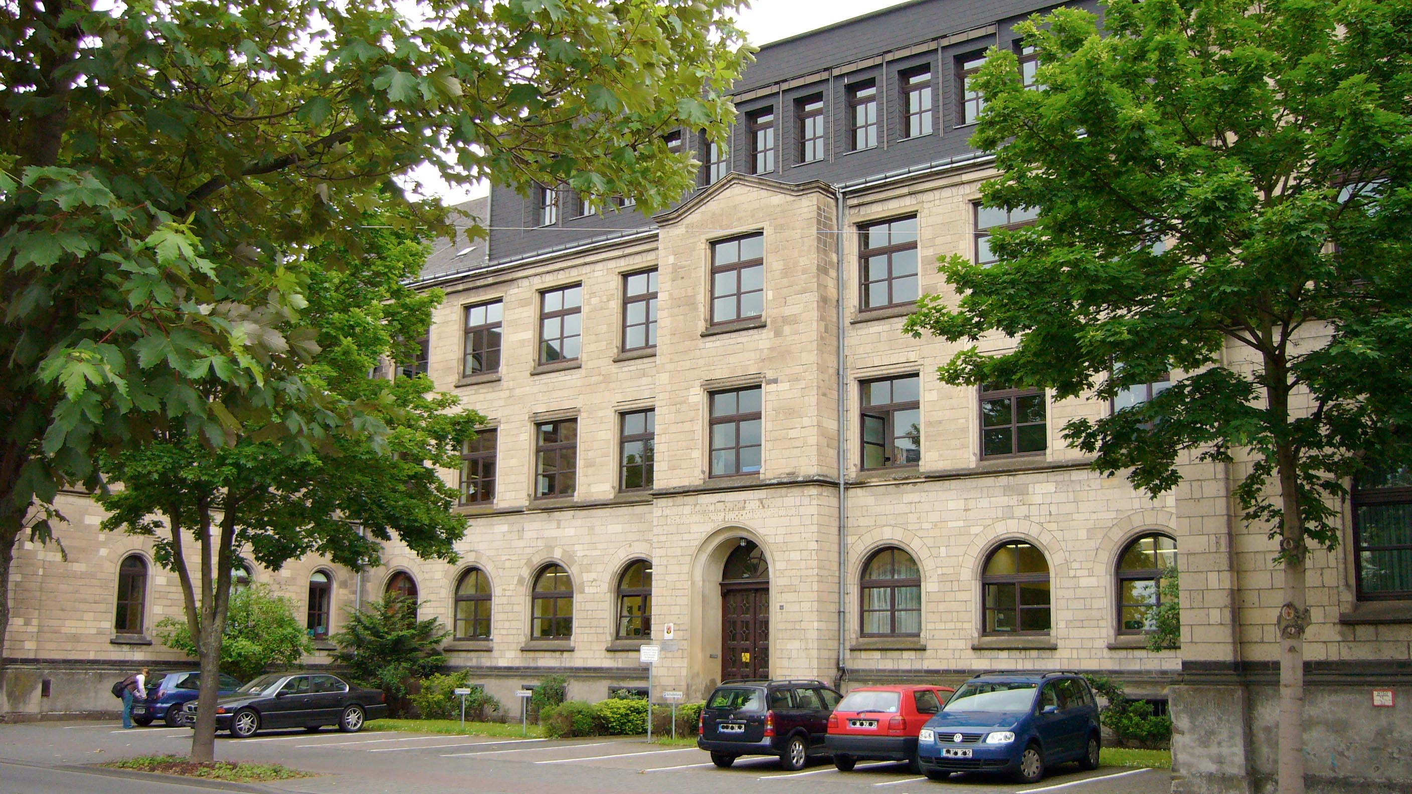 Werner-Heisenberg-Gymnasium